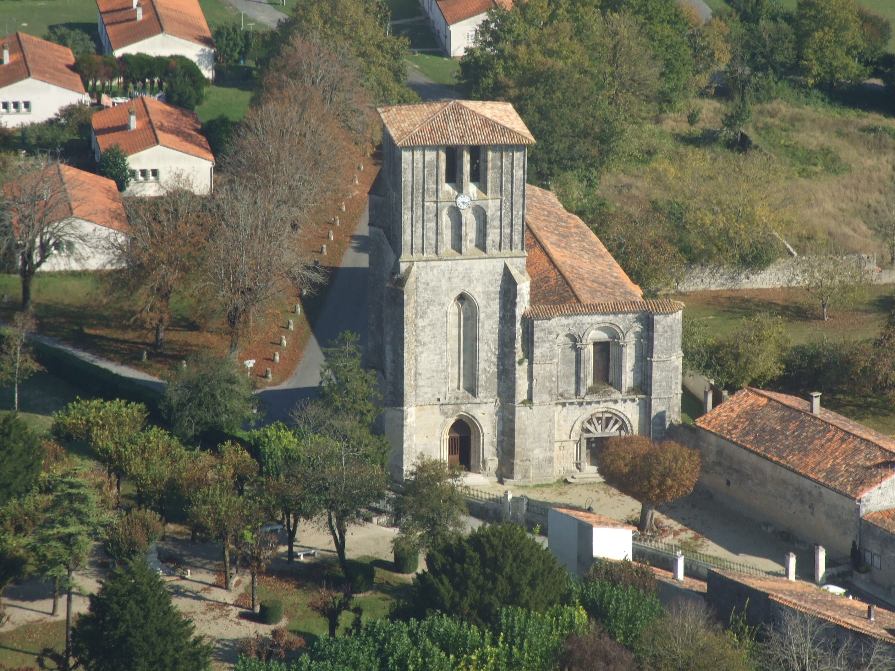 BEAUVAIS SUR MATHA VU DU CIEL